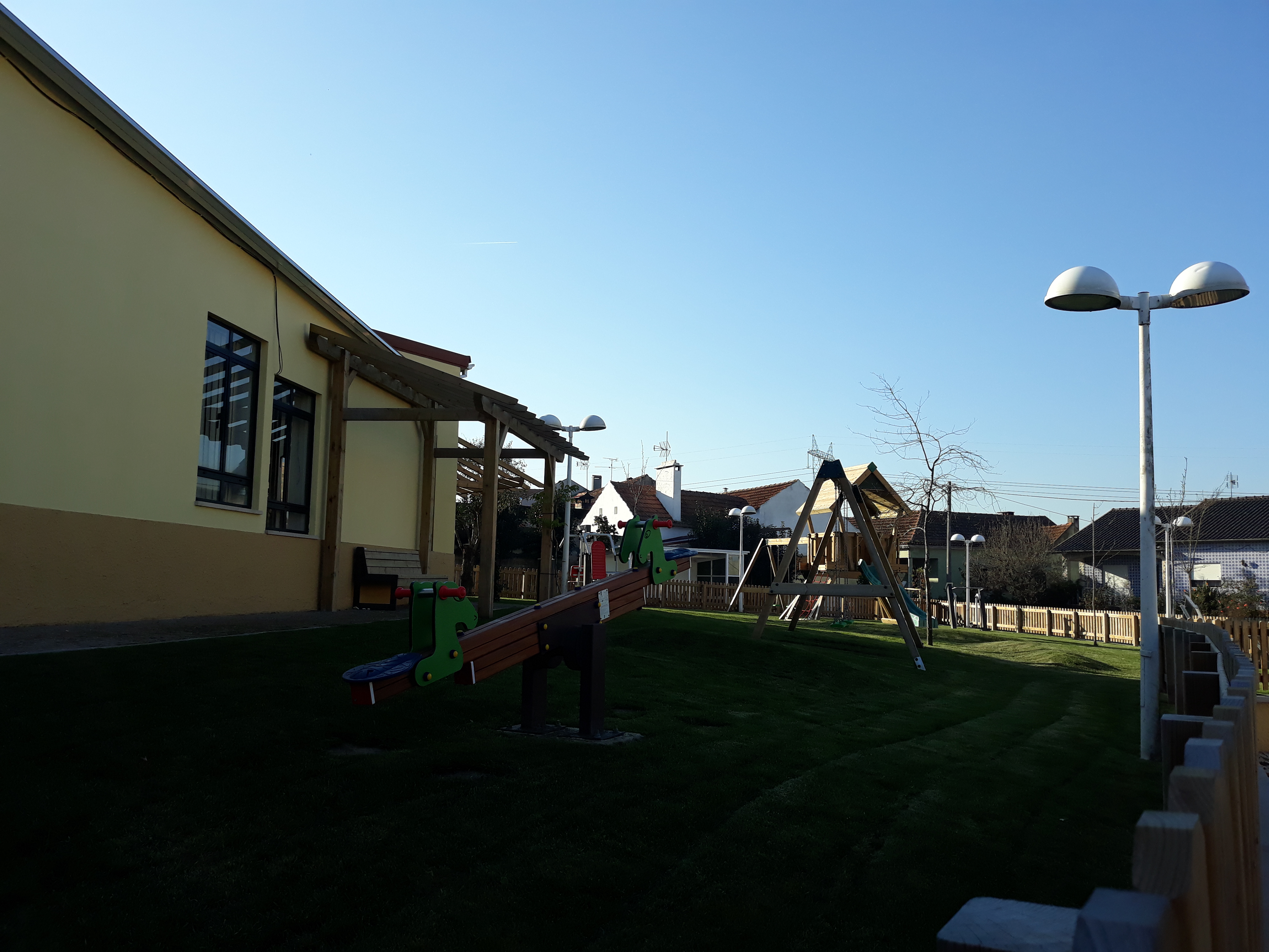 Parque